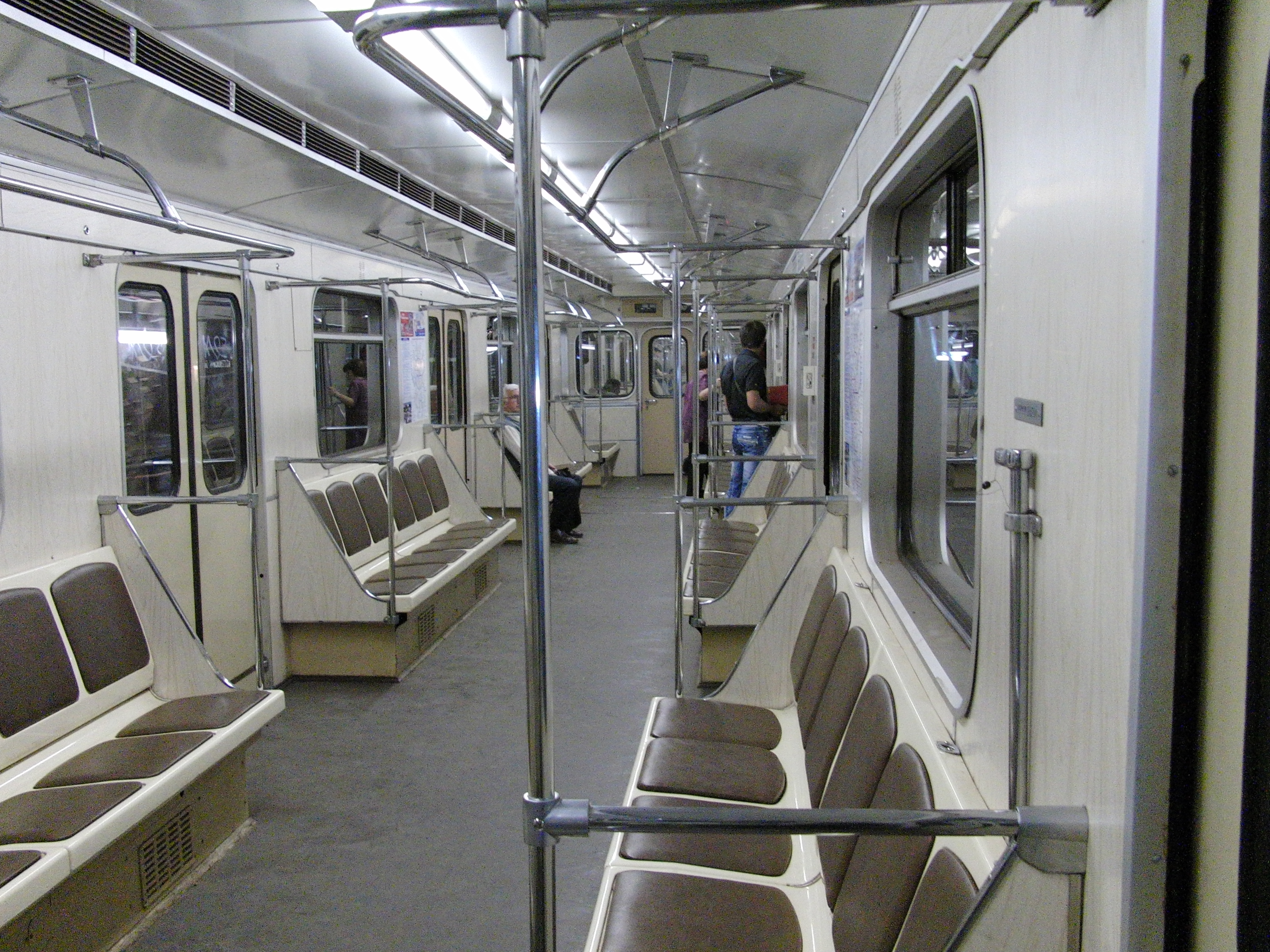 81-717/714 metro car of Lyublinsko-Dmitrovskaya line (Метровагон 81-717/714 Люблинско-Дмитровской линии)